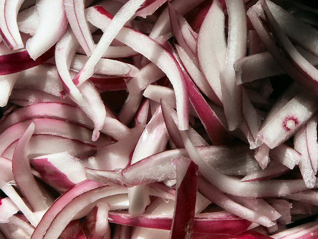 Rote Zwiebeln, aufgeschnitten